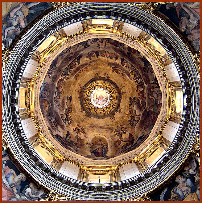 Interior da Igreja Trinità dei Monti, Roma.